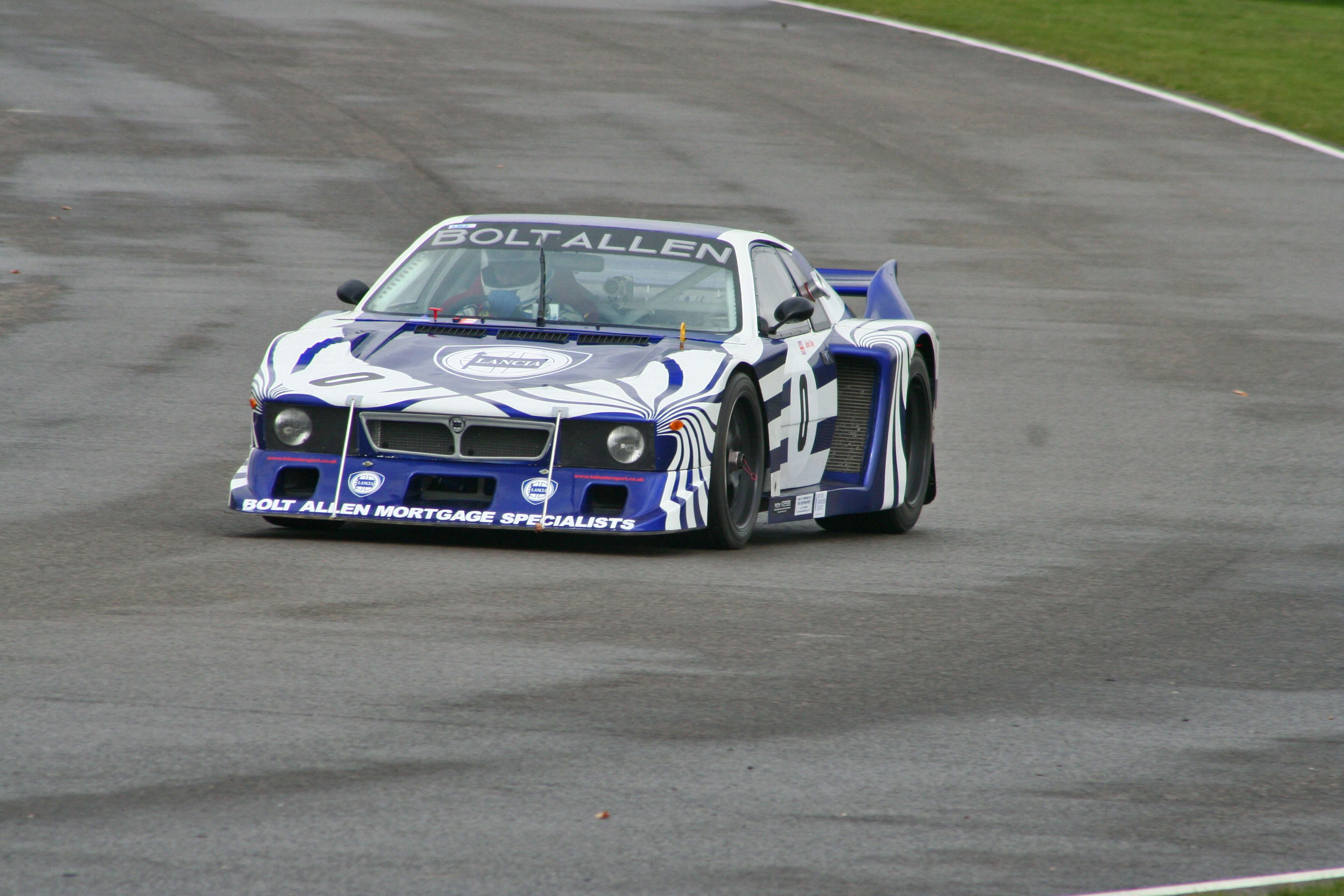 A Group 5 Lancia Beta Montecarlo